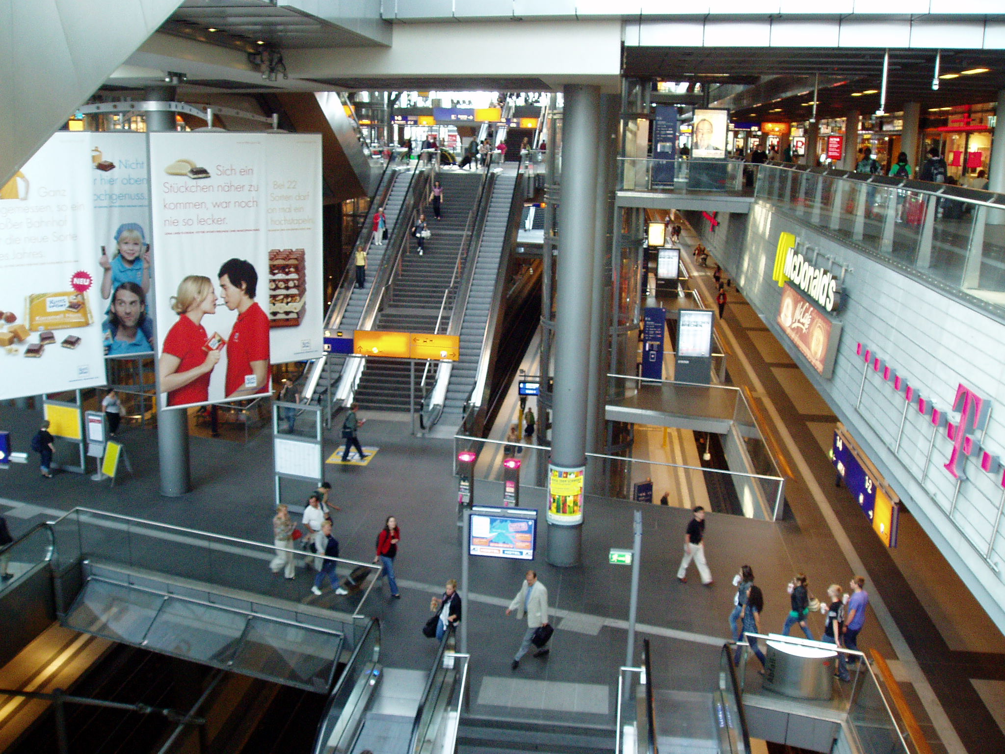 Berlin Hauptbahnhof, Blick ins Untergeschoss